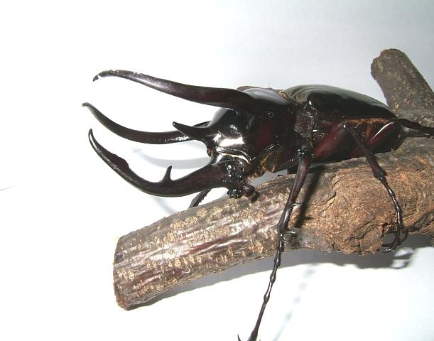 コーカサスオオカブトムシの写真